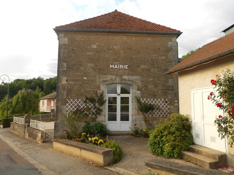 Maire Orcevaux